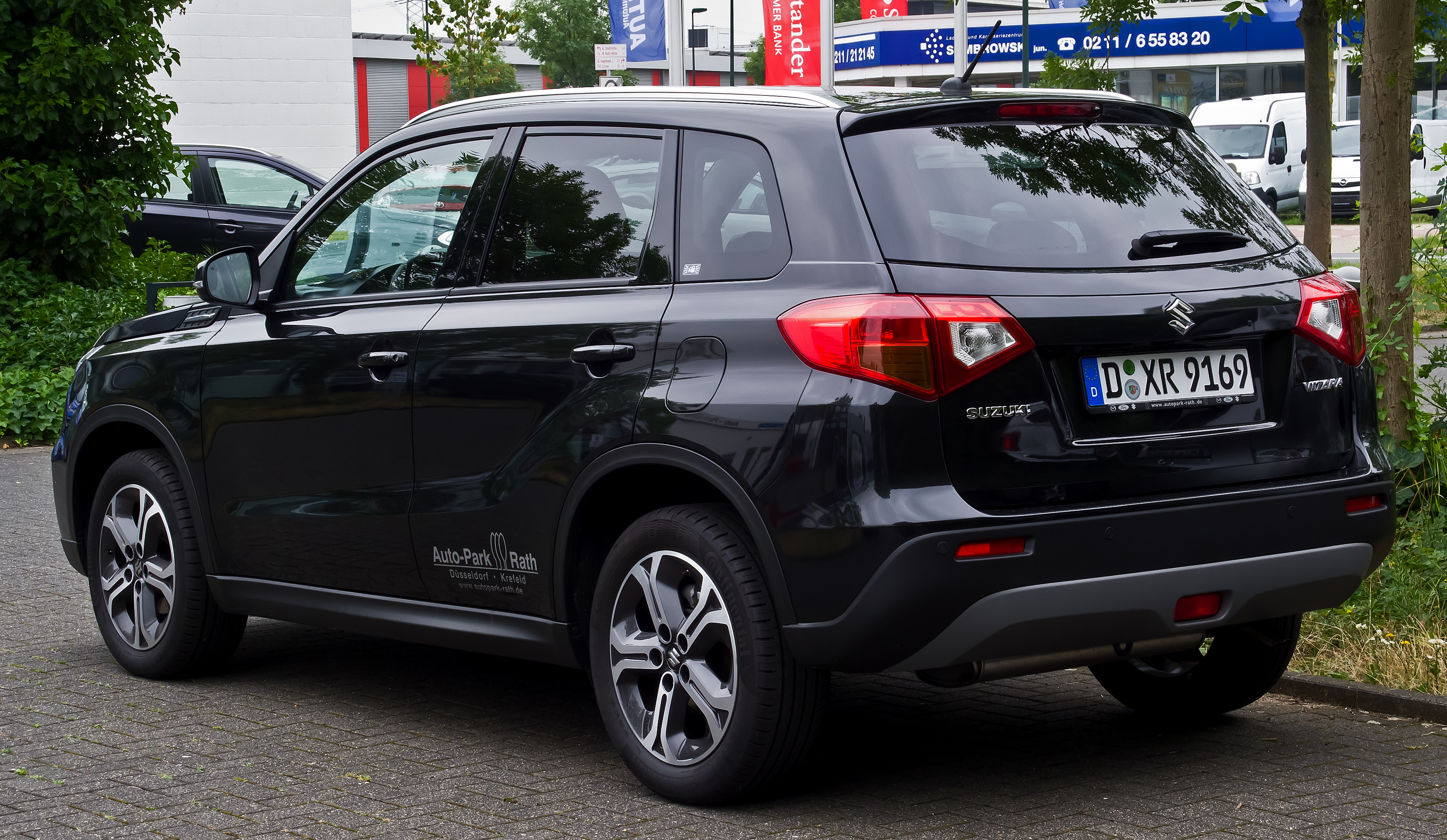 Suzuki Vitara 1.6 Comfort+ (IV)